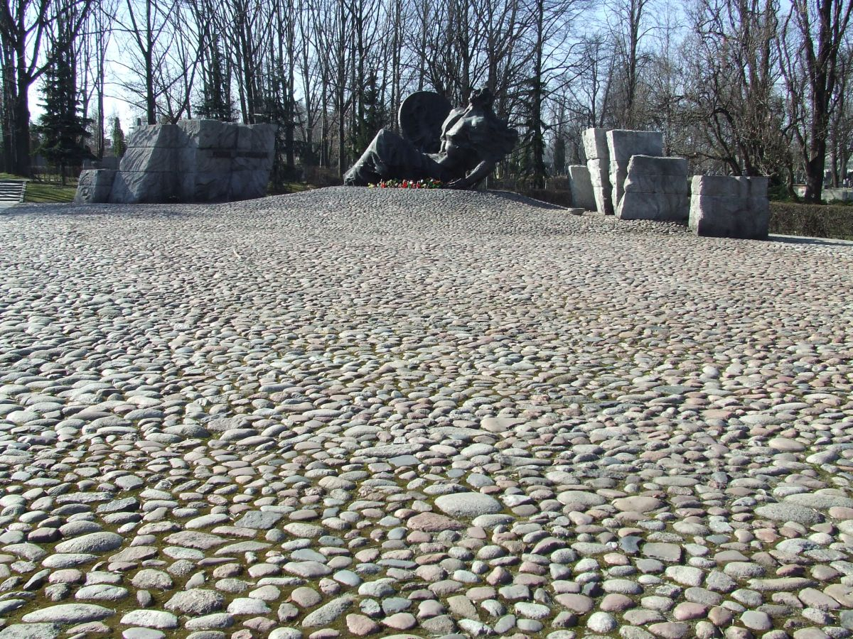 Cmentarz Powstańców Warszawy, Pomnik Polegli Niepokonani